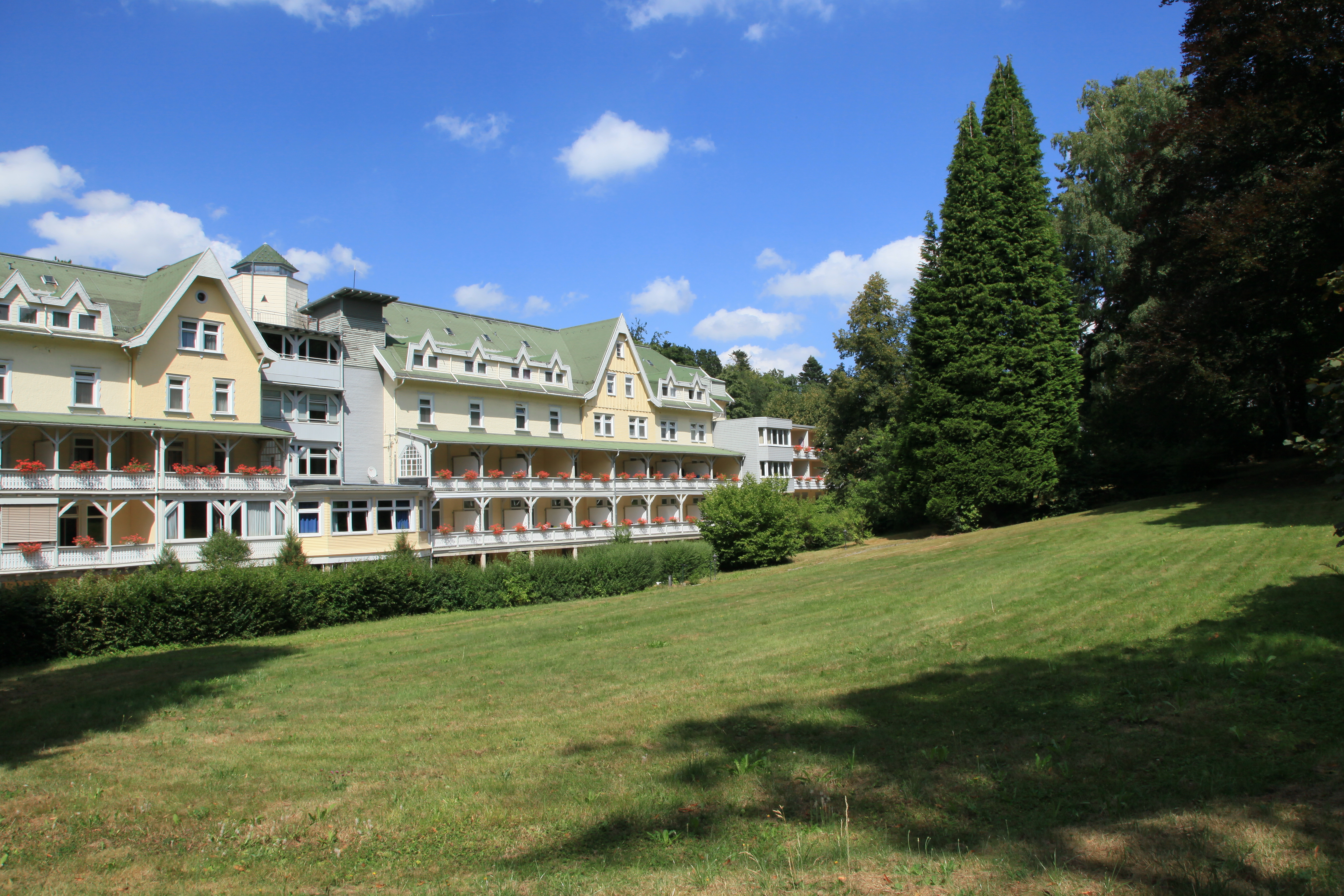 Celenus Klinik, Dr.-Schröder-Weg 12, im Klinikpark in Schömberg (Landkreis Calw)